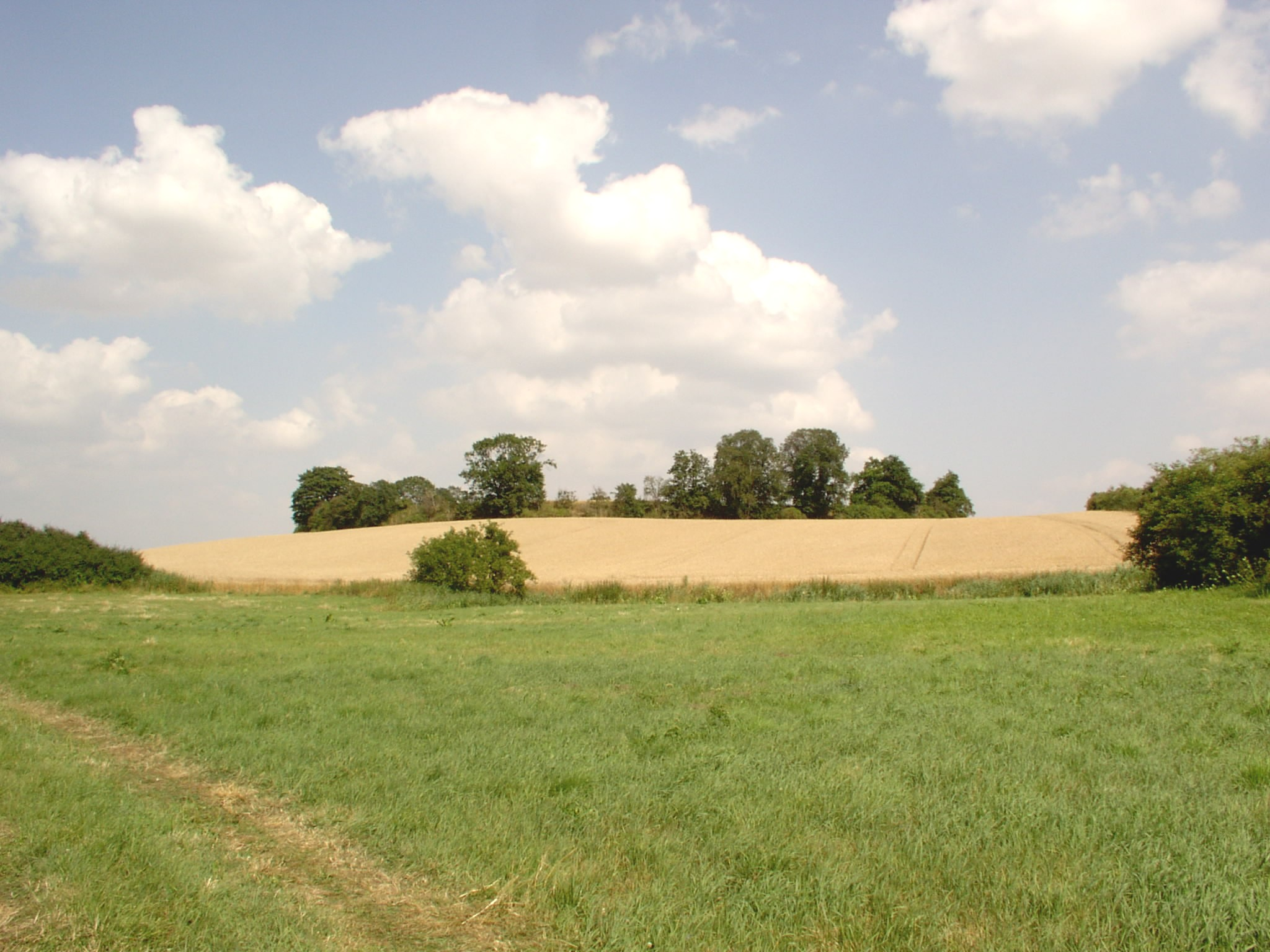 Slawischer Burgwall Grapenwerder bei Penzlin, Mecklenburg-Vorpommern.